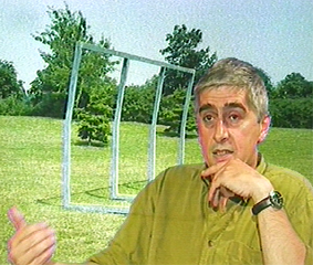 Portrait de Jean-Gabriel Coignet